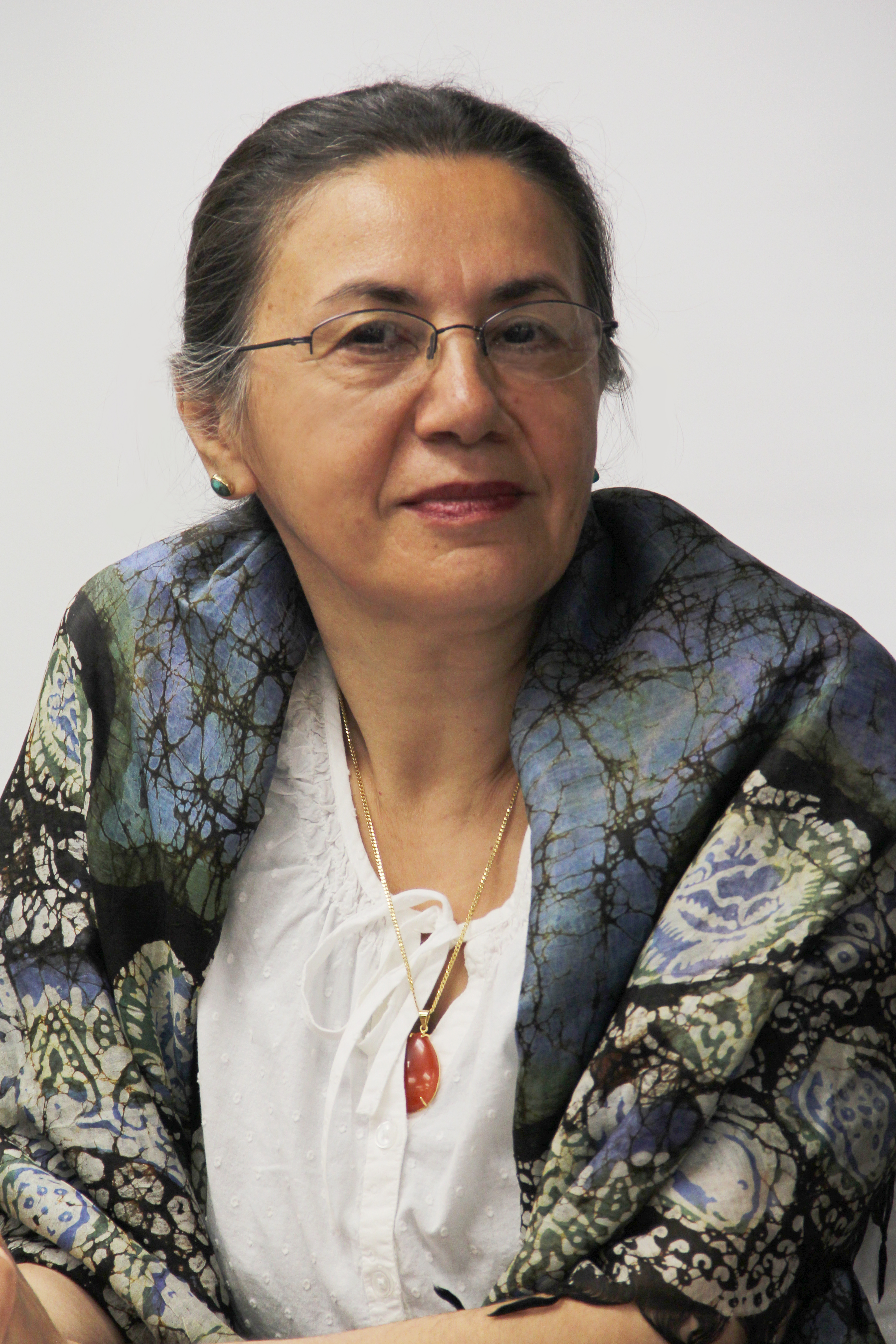 فرشته مولوی، تورنتو